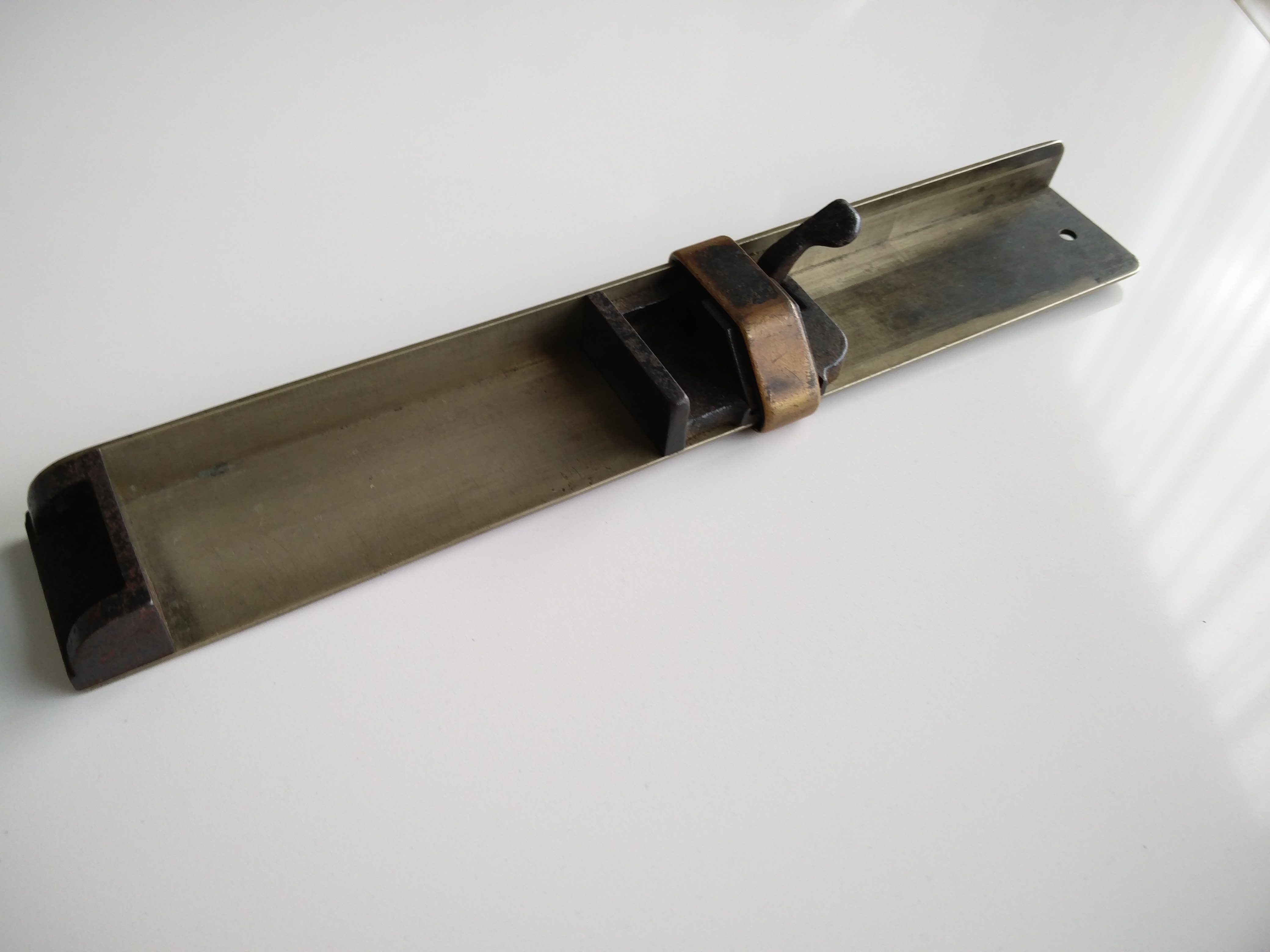 Zethaak